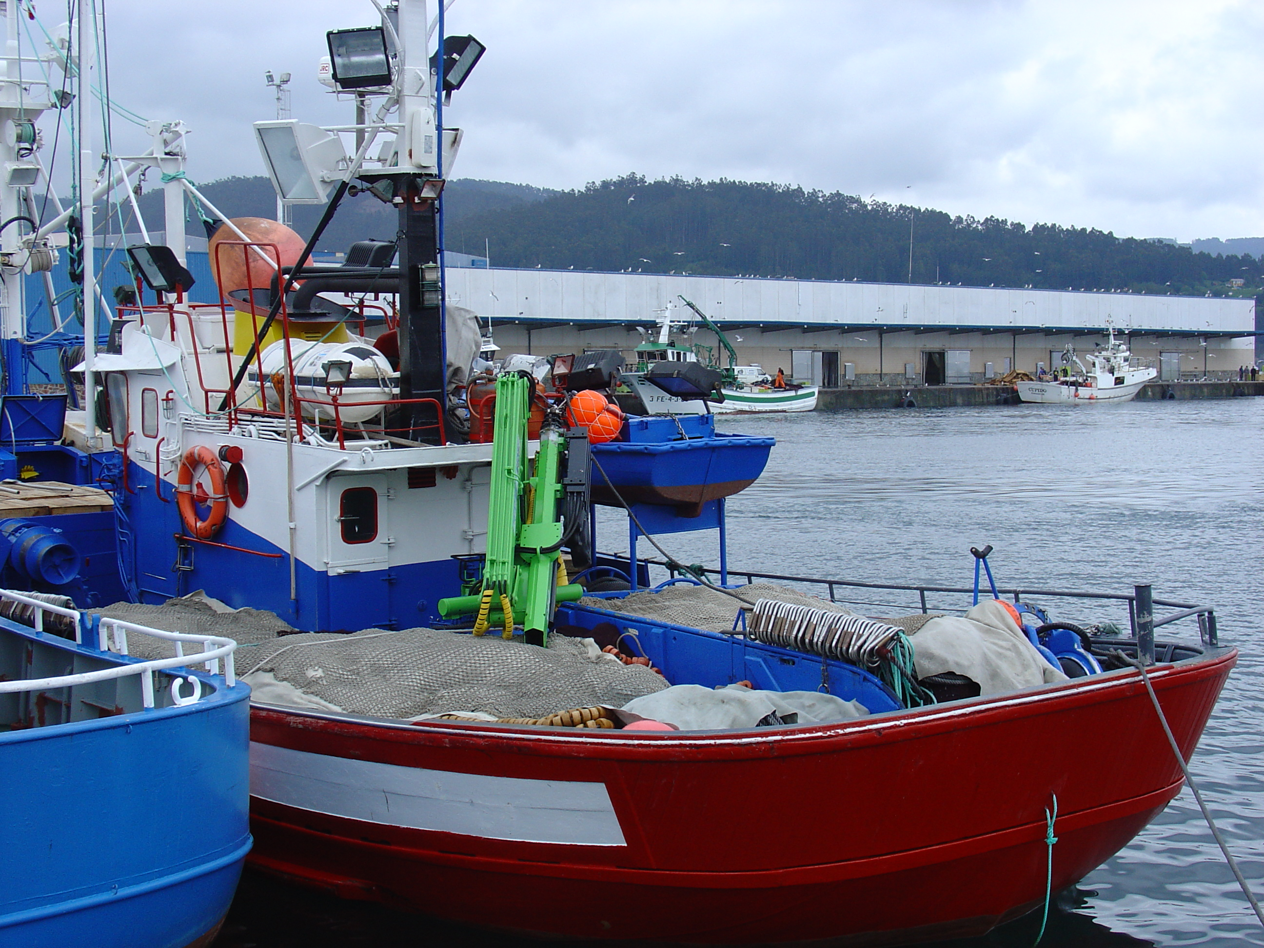 A Gaveira, Viveiro, Galiza Ficha do Buque Nome do buque Lista Matrícula Folio A GAVEIRA 3 FE-2 3006 RBPCAG 1992LU000090 Estado Alta Porto base Celeiro Caladoiro/Tipo de pesca CALADOIRO NACIONAL CERCO Artes CERCO Ano construción 1991 Data entrada en servizo 28/06/1991 Arqueo TRB 17,60 Arqueo GT 32,00 Eslora total 18.20 M. Eslora PP 15.60 M. Potencia 195.00 CV. Material casco Madeira